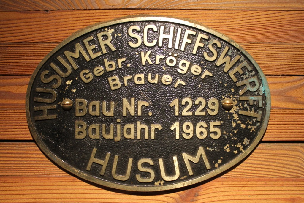 Bau Nummer 1229 der Husumer Schiffswerft